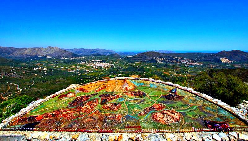 Un paradís entre natura